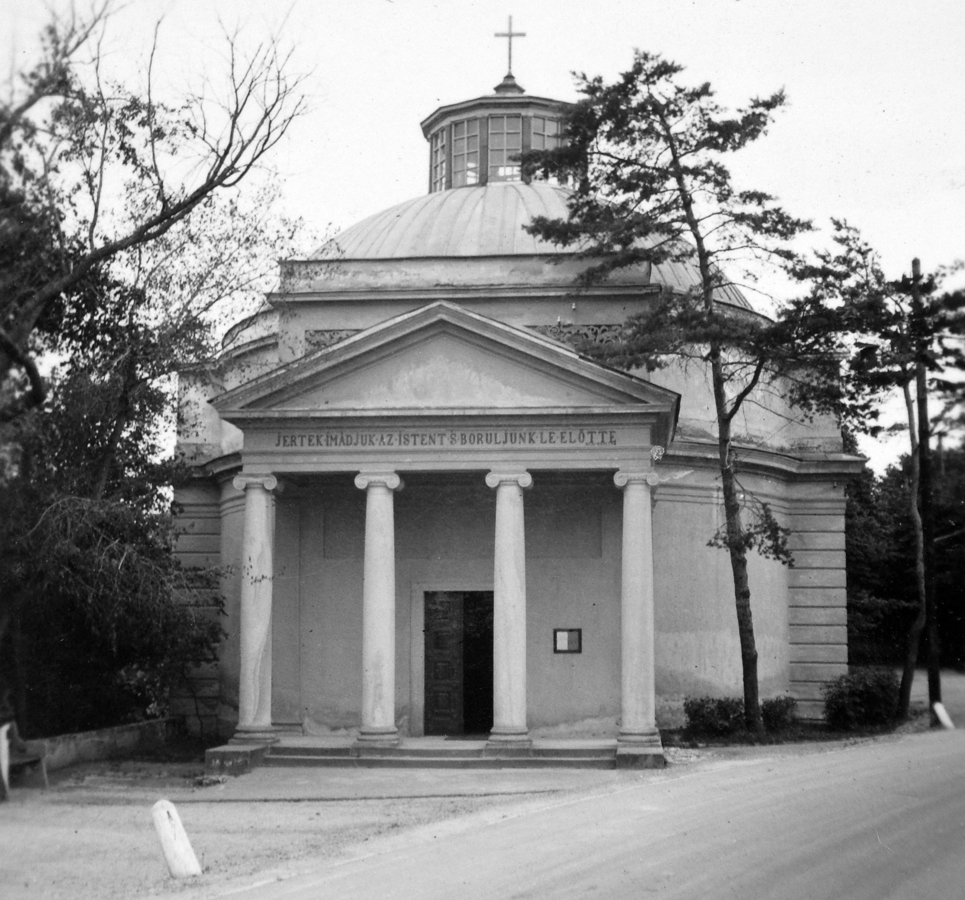 Kerektemplom. Location: Hungary, Balatonfüred Title: Kerektemplom.